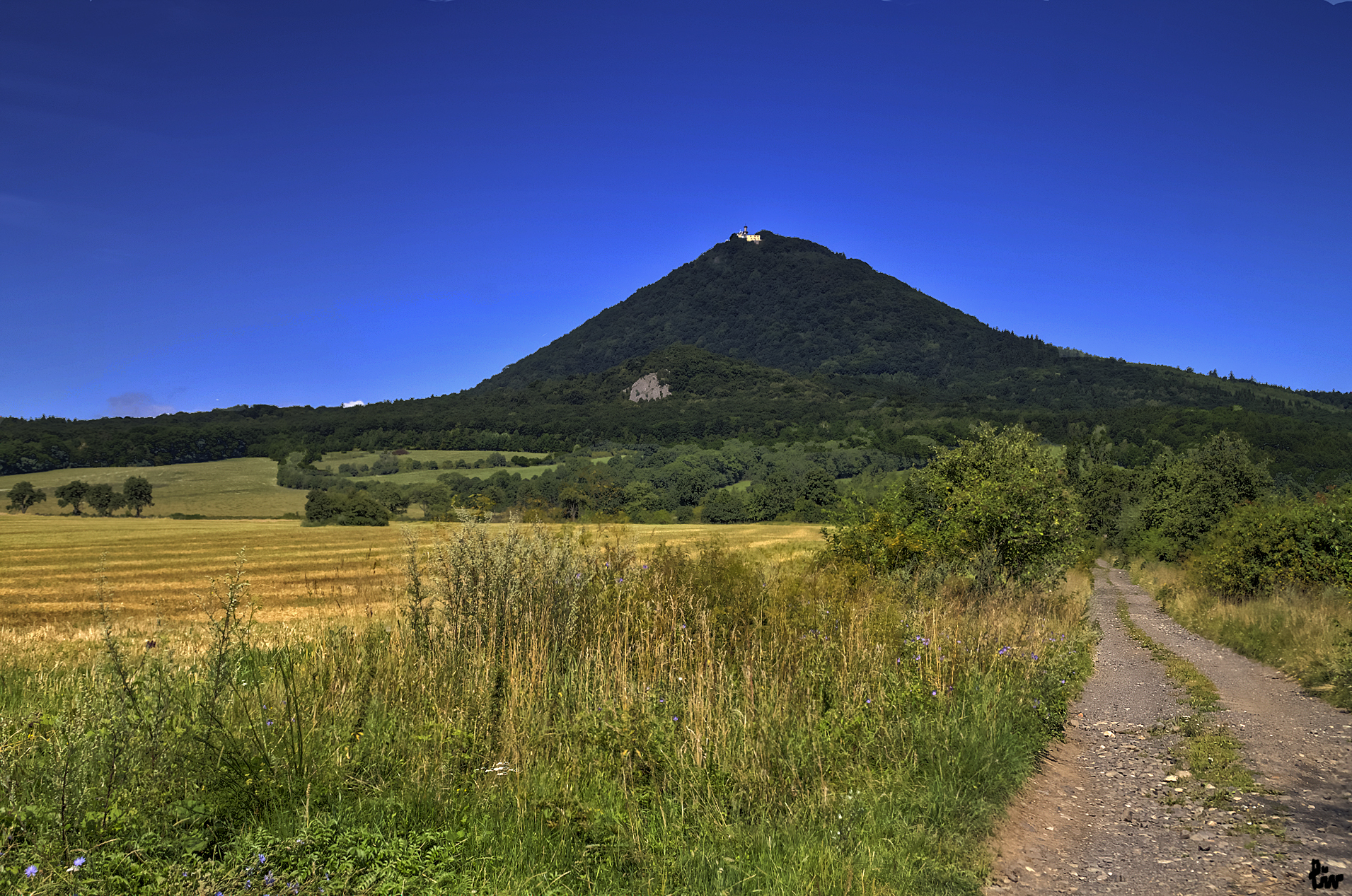 Pohled na Milešovku od jihovýchodu